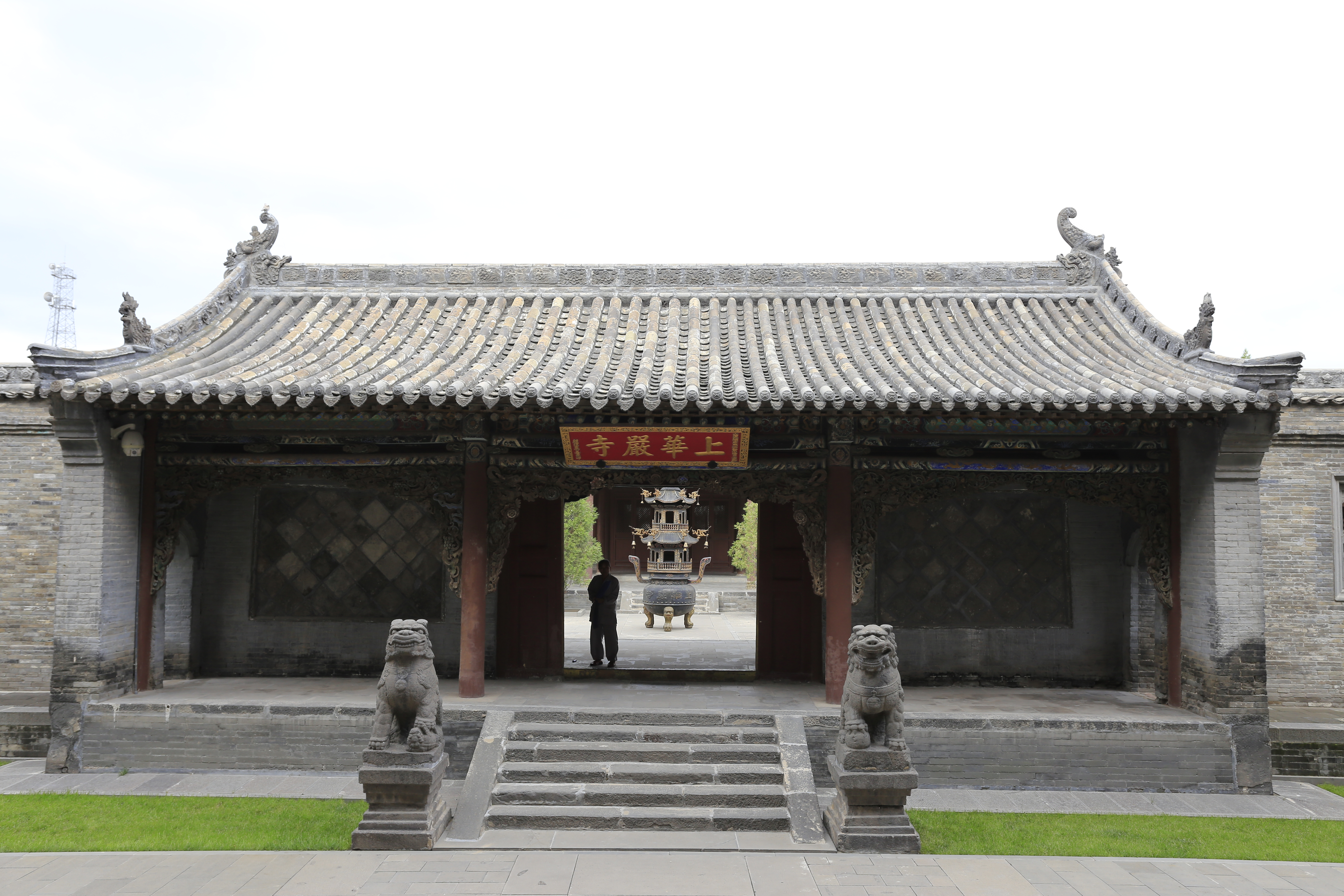 大同华严寺—— 普光明殿后侧的旧山门